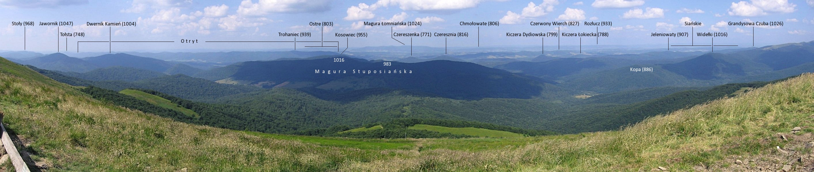 View from Połonina Caryńska (northern side)